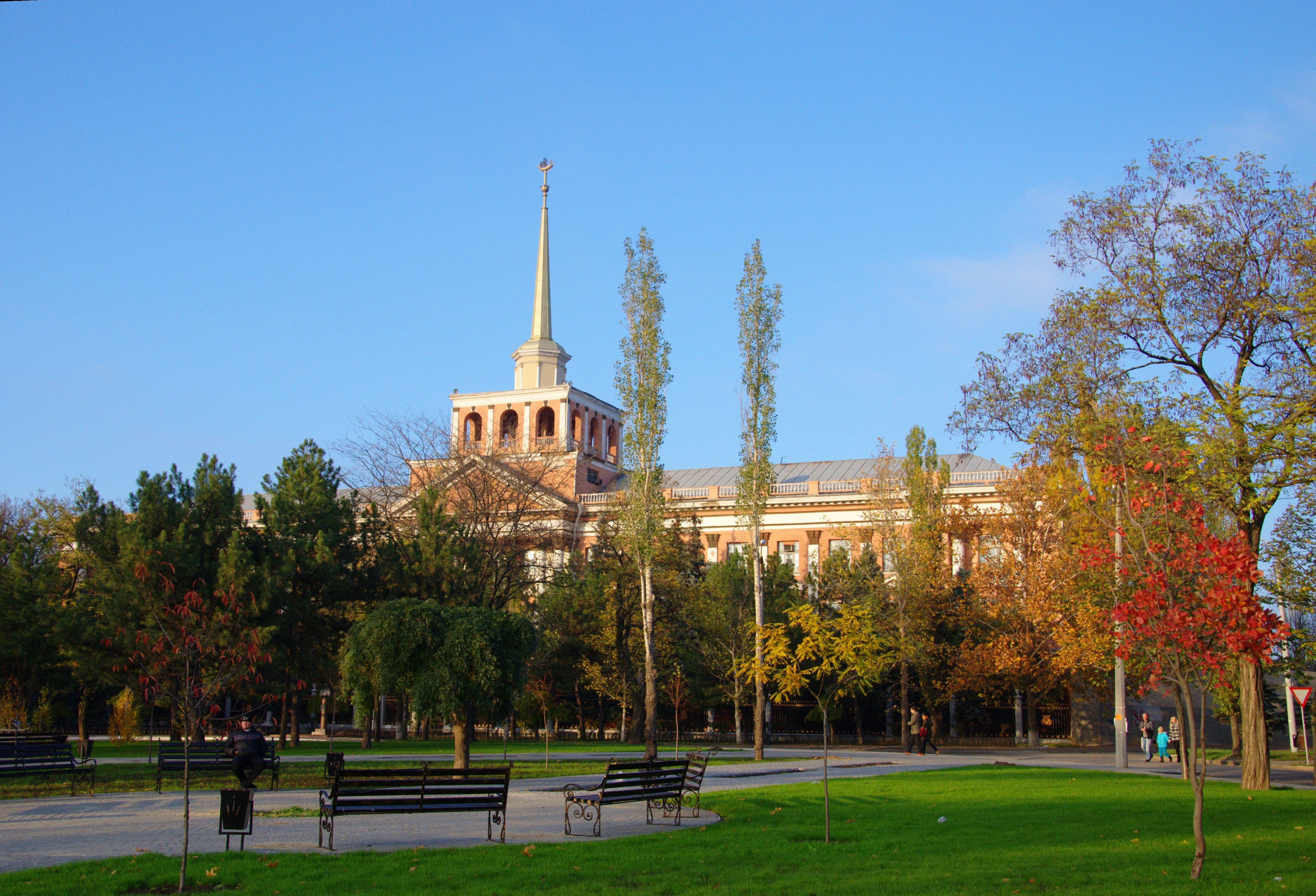 61plant2.jpg: Заводоуправління заводу 61-го комунара